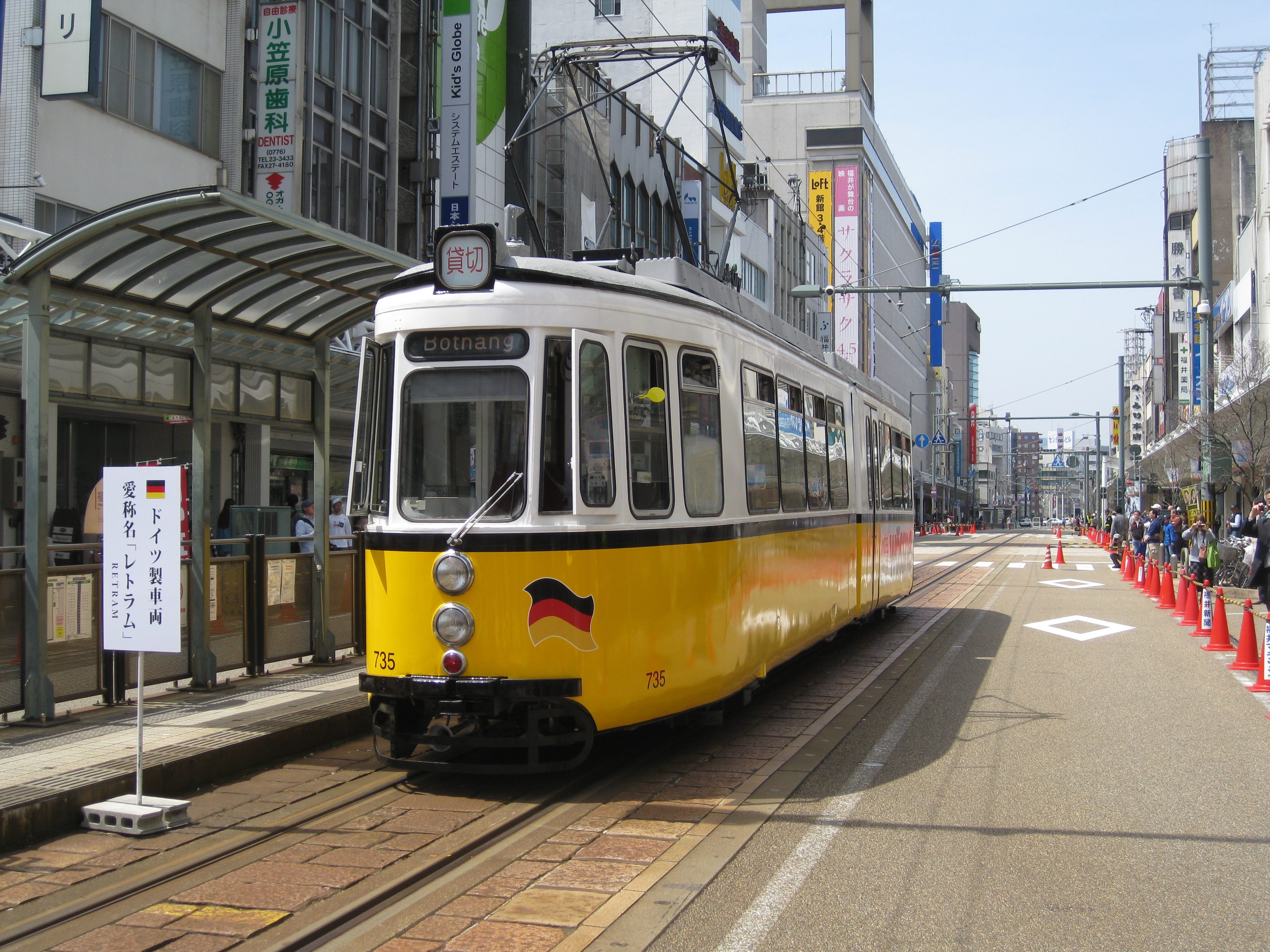 福井鉄道が導入した735形です。 出発式の際に撮影